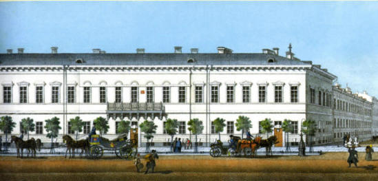 Демидовская гостиница, в которой жила П.Виардо. Фрагмент "Панорамы Невского проспекта". Литография И.А.Иванова по рисунку В.С.Садовникова. 1835